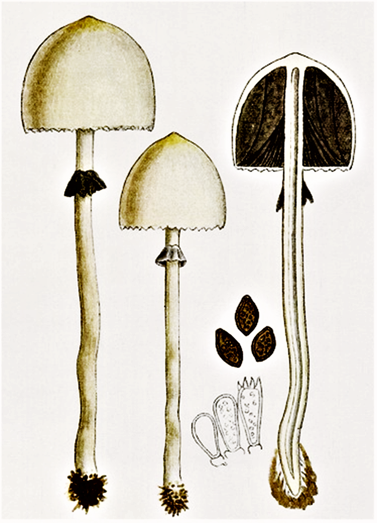 Bres.: Panaeolus Phalaenarum Bres.: Panaeolus Phalaenarum (Fr., 1838) Quél. (1872), heute Panaeolus semiovatus (Sowerby, 1798) S.Lundell & Nannf. (1938)